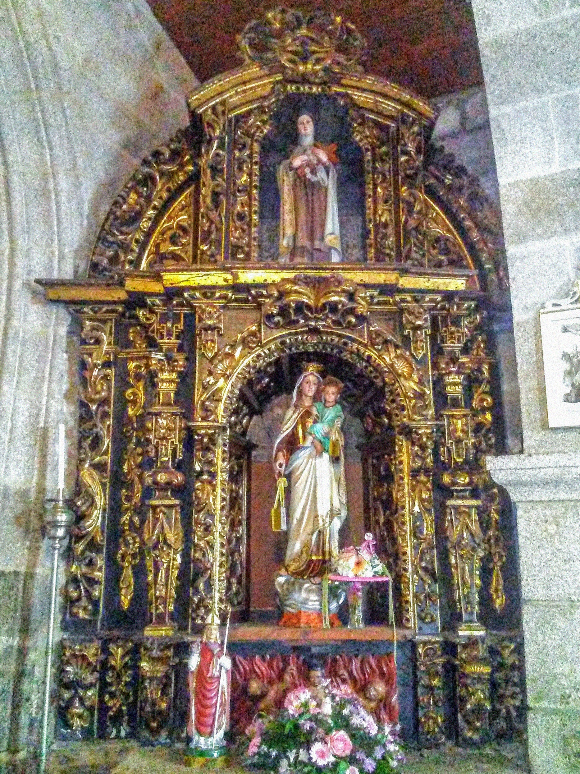 Iglesia de San Ginés de Padriñán (Sanxenxo, Pontevedra)